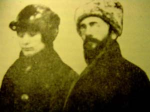 L'anarchica russa Fanya Baron (?-1921) fotografata assieme al marito Aaron.